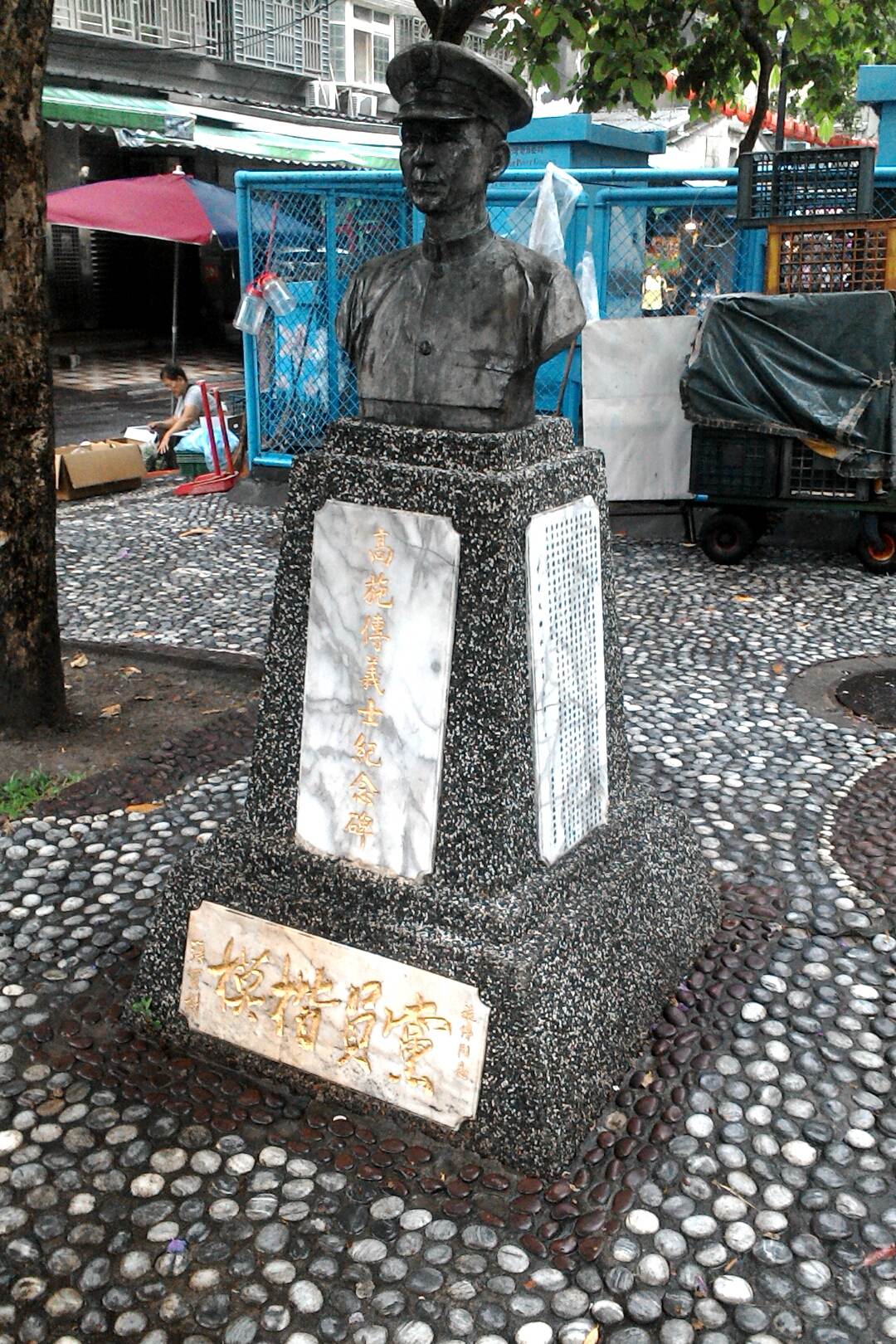 高施傳銅像全景，臺北市中山區圓山次分區集英里